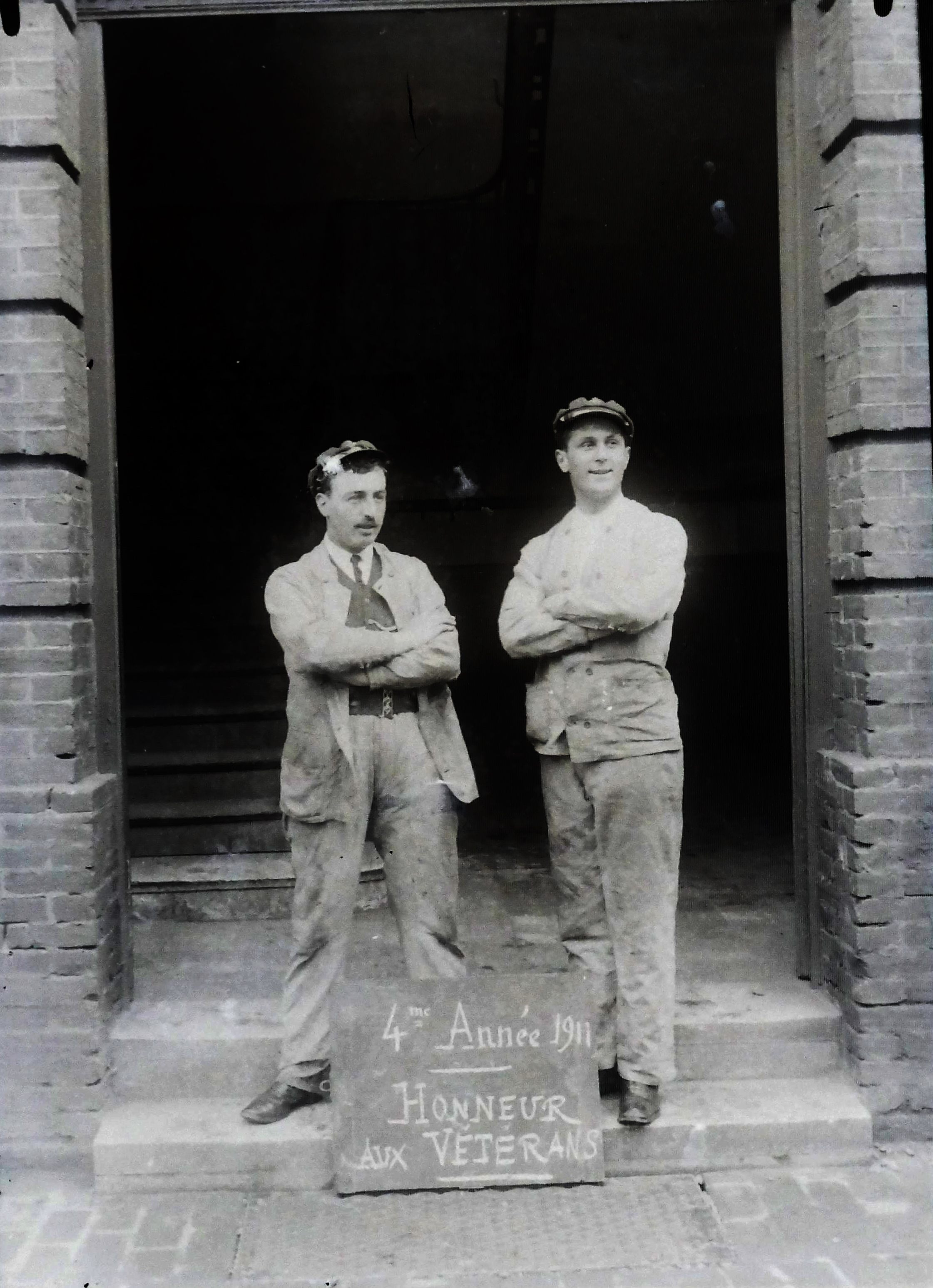 étudiants de 4éme année école pratique industrie le Havre